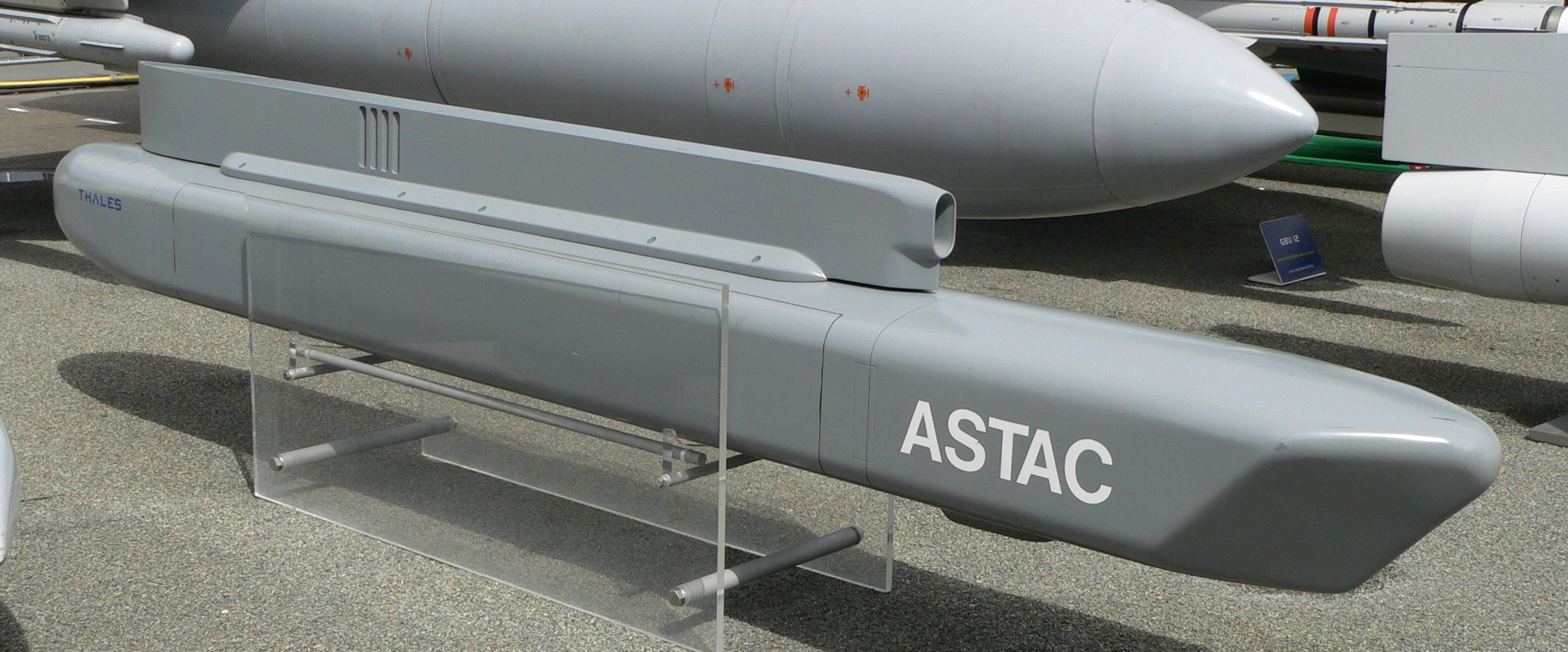 Dassault Mirage 2000: ASTAC (Analyseur de signaux taactiques) pod